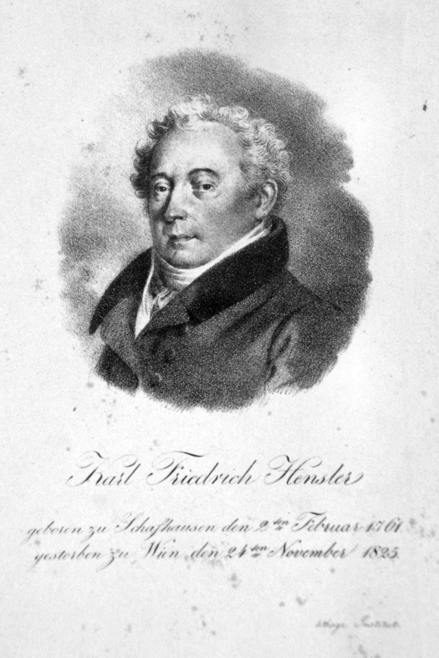 Karl Friedrich Hensler 1759-1825), Dramatiker, Schauspieler, Theaterdirektor. Lithographie von Josef Lanzedelli d. Ä., ca. 1820